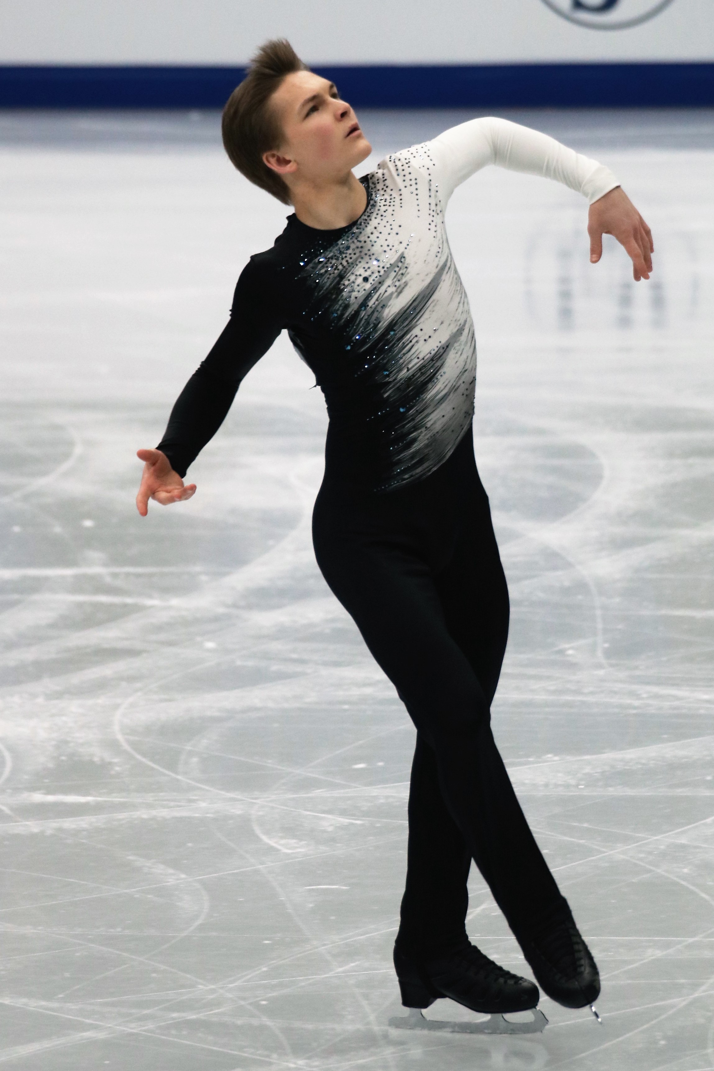 Михаил Коляда (Россия) на Чемпионате Европы по фигурному катанию 2018.